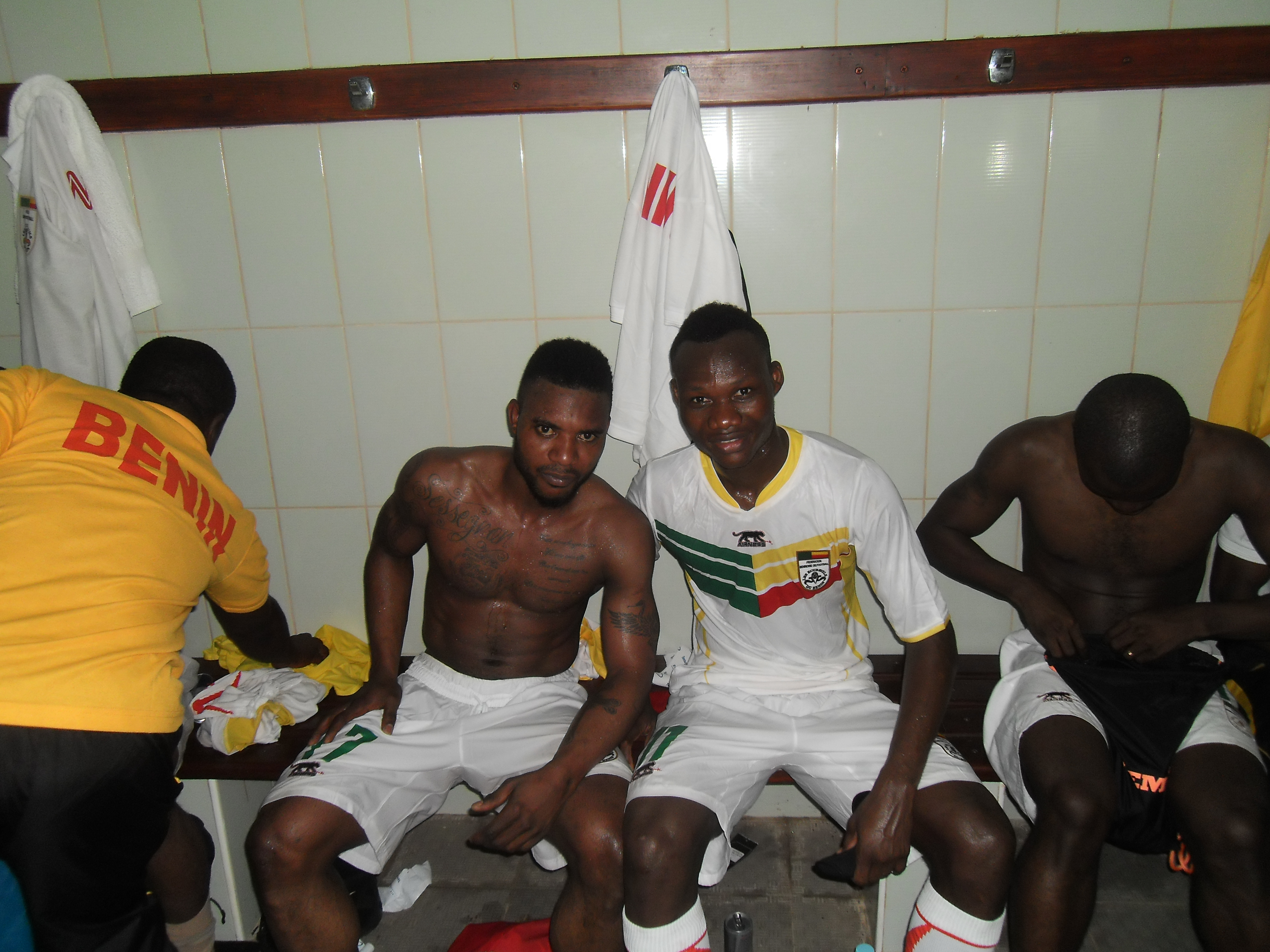 Désiré Sègbè Azankpo est né le 6 Mai 1993 au Bénin. Du haut de ses 21 ans, il est international béninois depuis le 17 Mai 2014. Ses prouesses techniques, ses conduites de balle, sa puissant athlétique, sa lourde frappe, sa pointe de vitesse phénoménale et ses passements de jambes hors pairs ont poussés le nouveau sélectionneur des Ecureuils du Bénin, Ollé-Nicole, a lui confié la pointe de l’attaque de l’équipe nationale du Bénin aux côtés de Stéphane Sessegnon et Razack Omotoyossi. Parcours Professionnel : 2013-2014: Fc Metz contrat pro et jeunesse d'esch (du 31 Janvier au 31 Mai) 2012-2013: Fc Metz contrat stagiaire. 2011-2012: Fc Metz contrat stagiaire. 2010-2011: Génération Foot de Dakar (ligue 2 professionnelle) 2009-2010: Génération Foot de Dakar (Champion de National 1) 2008-2009: Bénin Foot Académie.